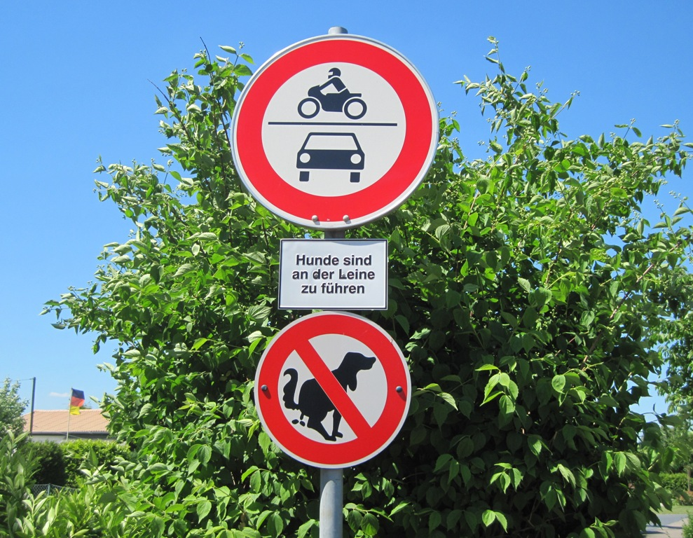 Kombination mehrerer Verbotsschilder mit einem Textschild